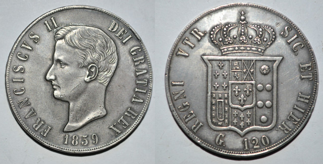 Moneta d'argento da 120 Grana (anche detta piastra), Regno delle Due Sicilie, 1859.